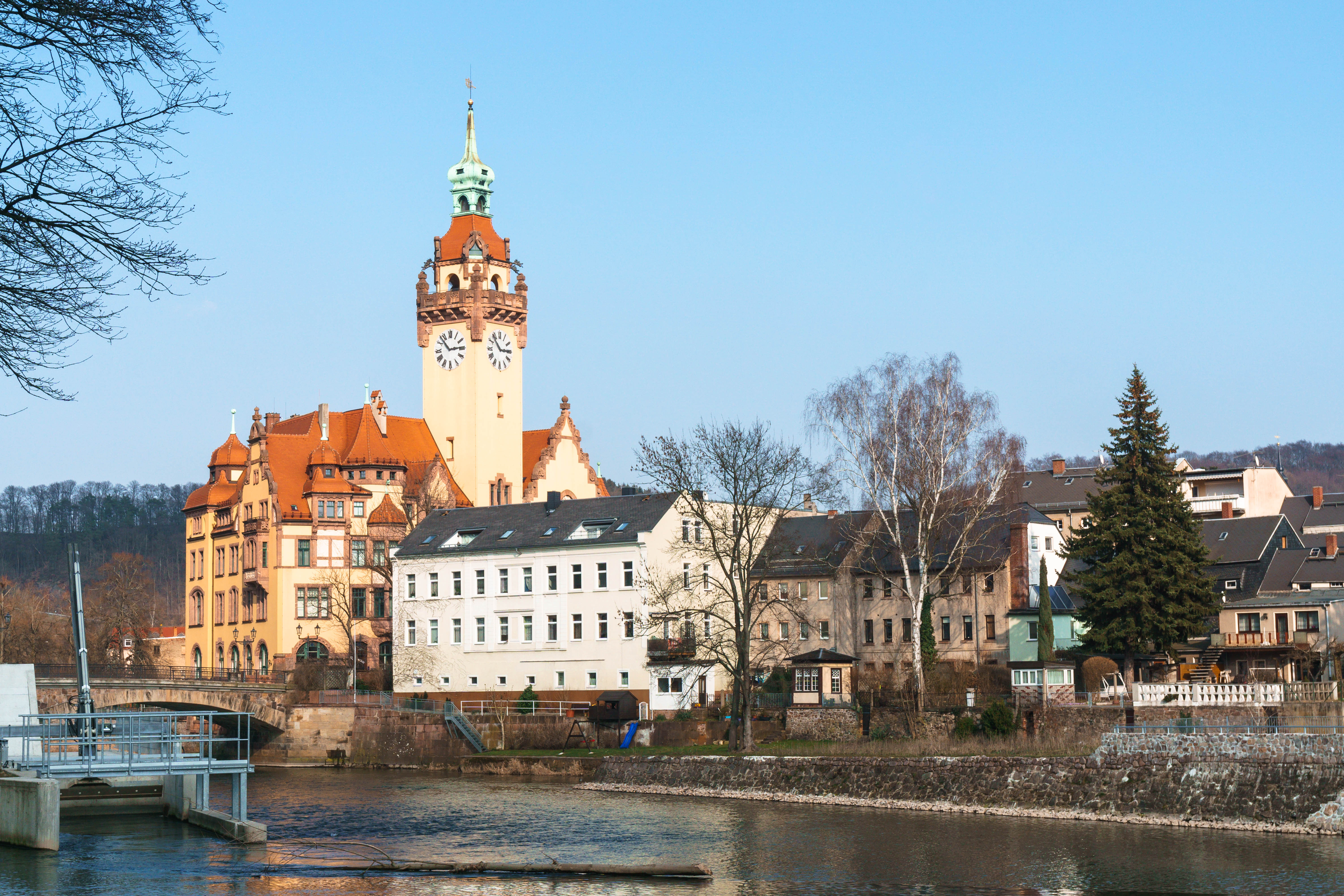 Zschopau, Pöppelmannbrücke und Rathaus in Waldheim